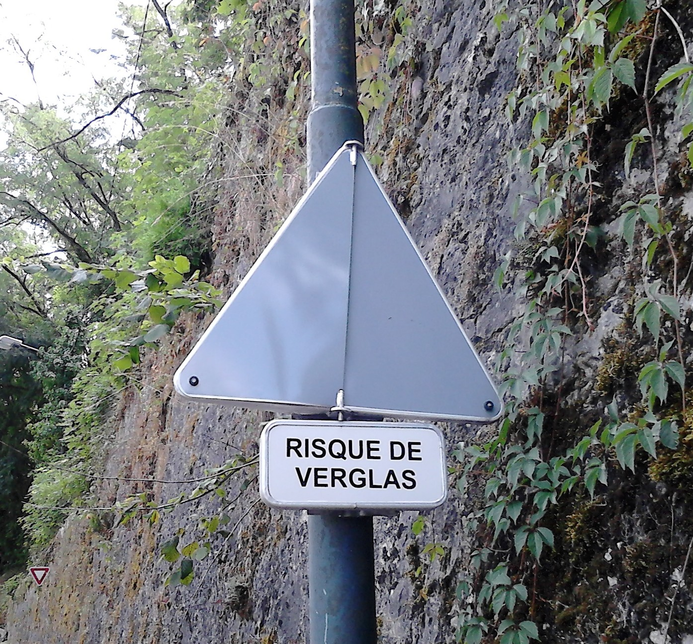 Panneau de type A4 occultable (chaussée glissante) et son panonceau M9z (risque de verglas).